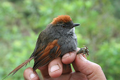 Azara's Spinetail (Synallaxis azarae infumata). Acobamba, Junin Dept., Peru 11°46'22S - 74°47'28W 2320m